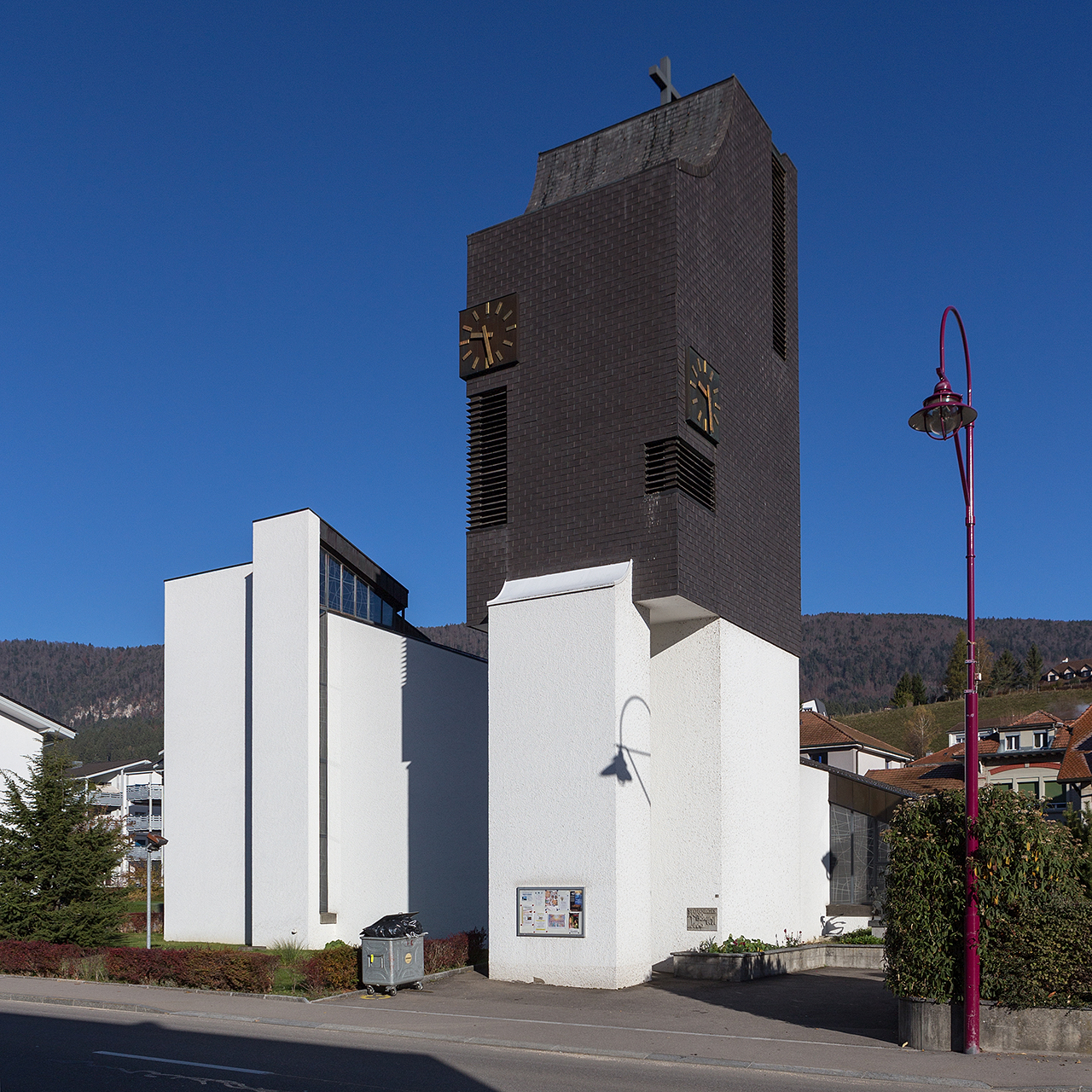 Katholische Kirche St-Georges (1971-72) an der Grand-Rue in Malleray (BE)